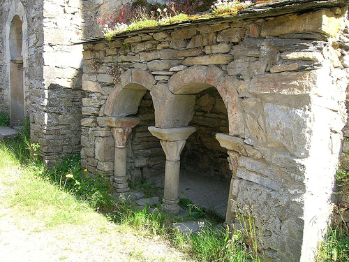 En el muro norte y adosado al contraábside, se encuentra este sepulcro románico, que pudo ser construido en la segunda mitad del siglo XII, con piezas probablemente reutilizadas. La tradición oral afirma que es de San Fortis, discípulo y sucesor de San Genadio.